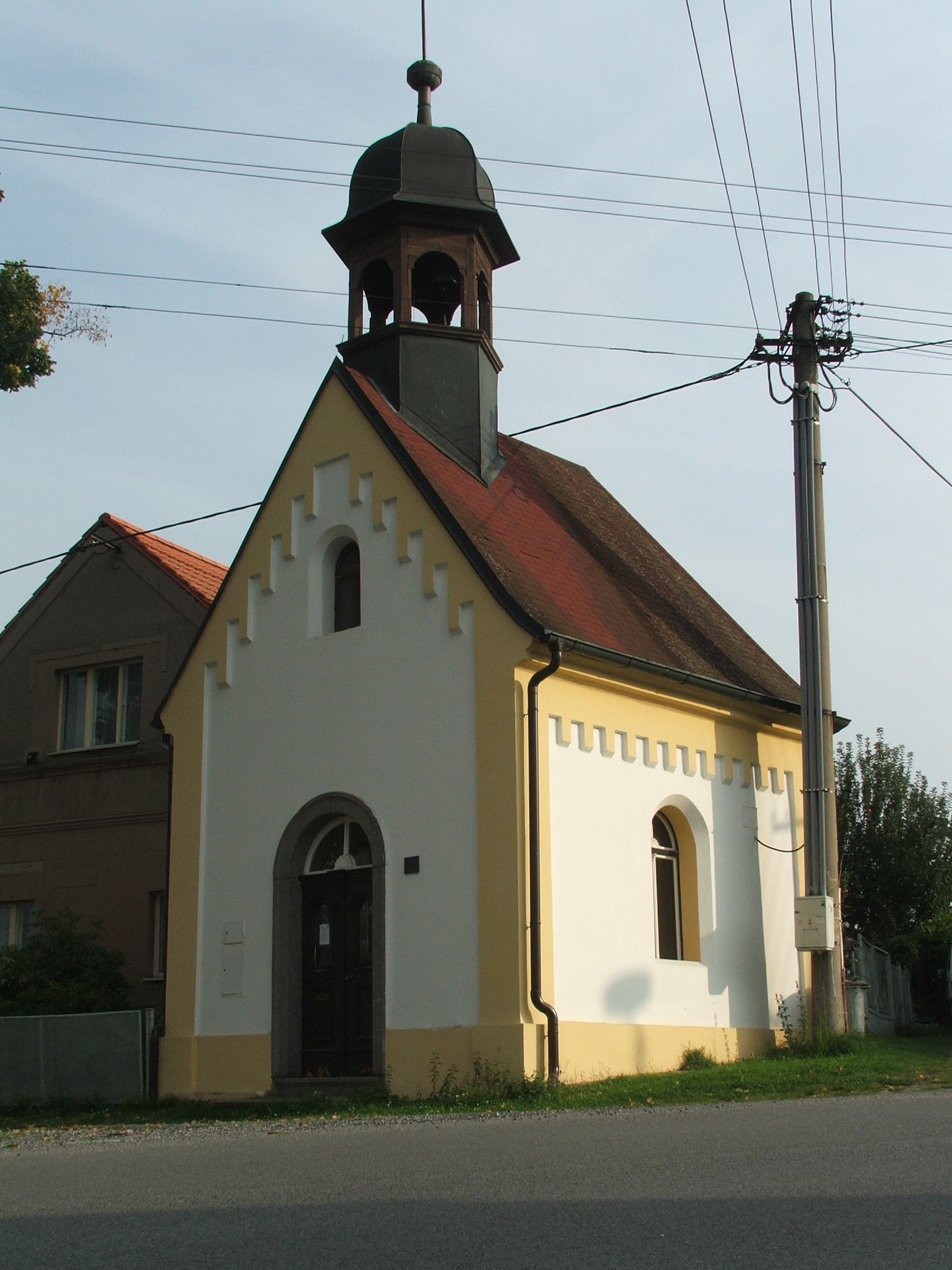 Kaplička svatého Jana Nepomuckého, Kaznějov.